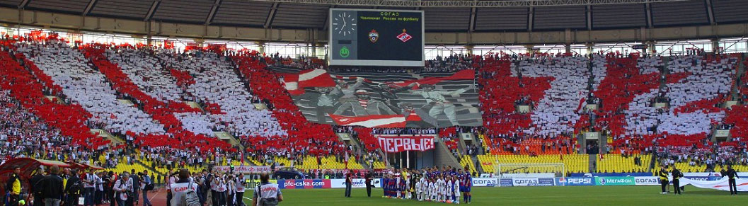 Перфоманс 1972